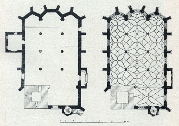 Vlevo půdorys, vpravo klenba kostela sv. Mikuláše v Lounech